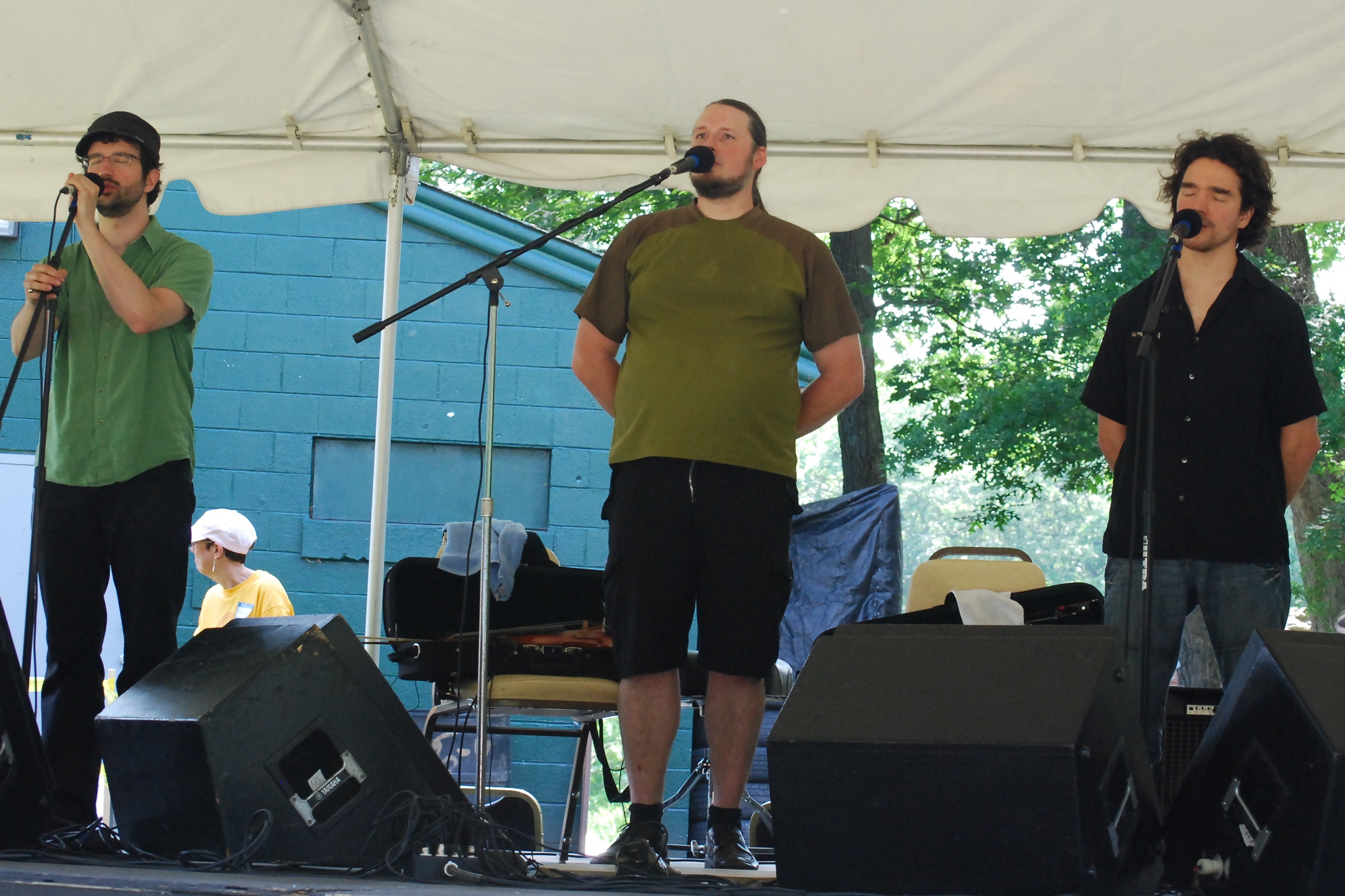 Genticorum - Solstice Festival